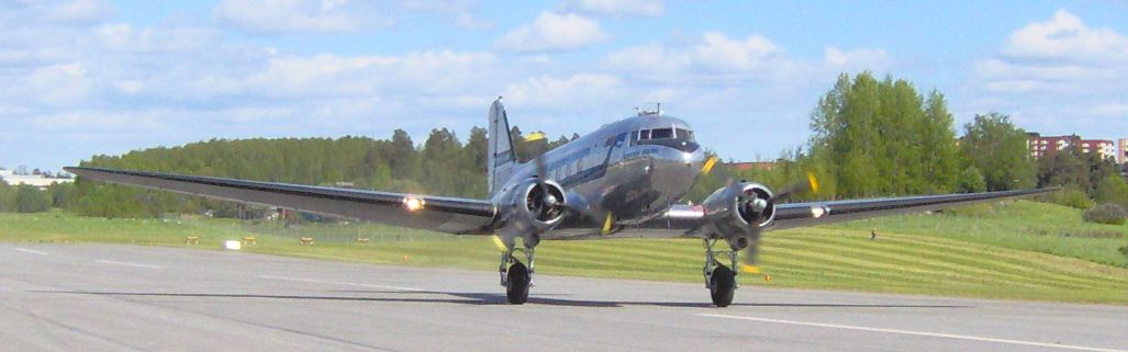 DC 3 Daisy, veteranflygplanet startar på Stockholm-Barkarby flygfält på fly inn 2006 DC 3 Vteranairplane called Daisy. Taking off at Stockholm-Barkarby airstrip in Geater Stockholm, Sweden att the fly inn.